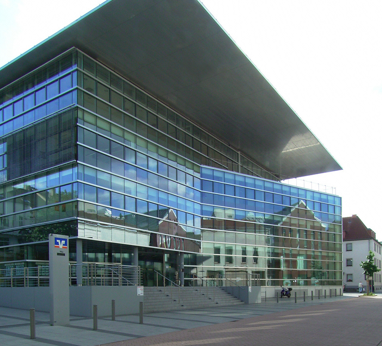 Das neue Volksbank-Gebäude in Unna, Nordrhein-Westfalen